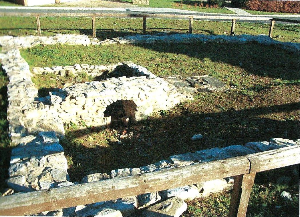 středověká úpravna zlatých rud v Kašperských Horách (archeologická lokalita)